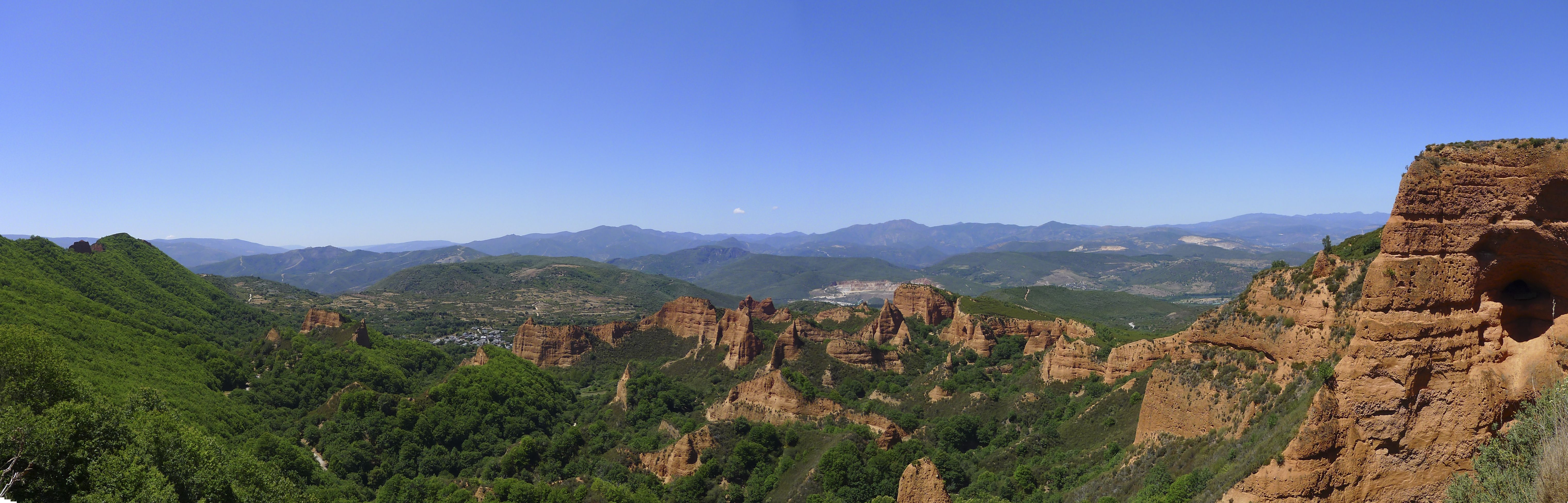 Las Médulas - 2012